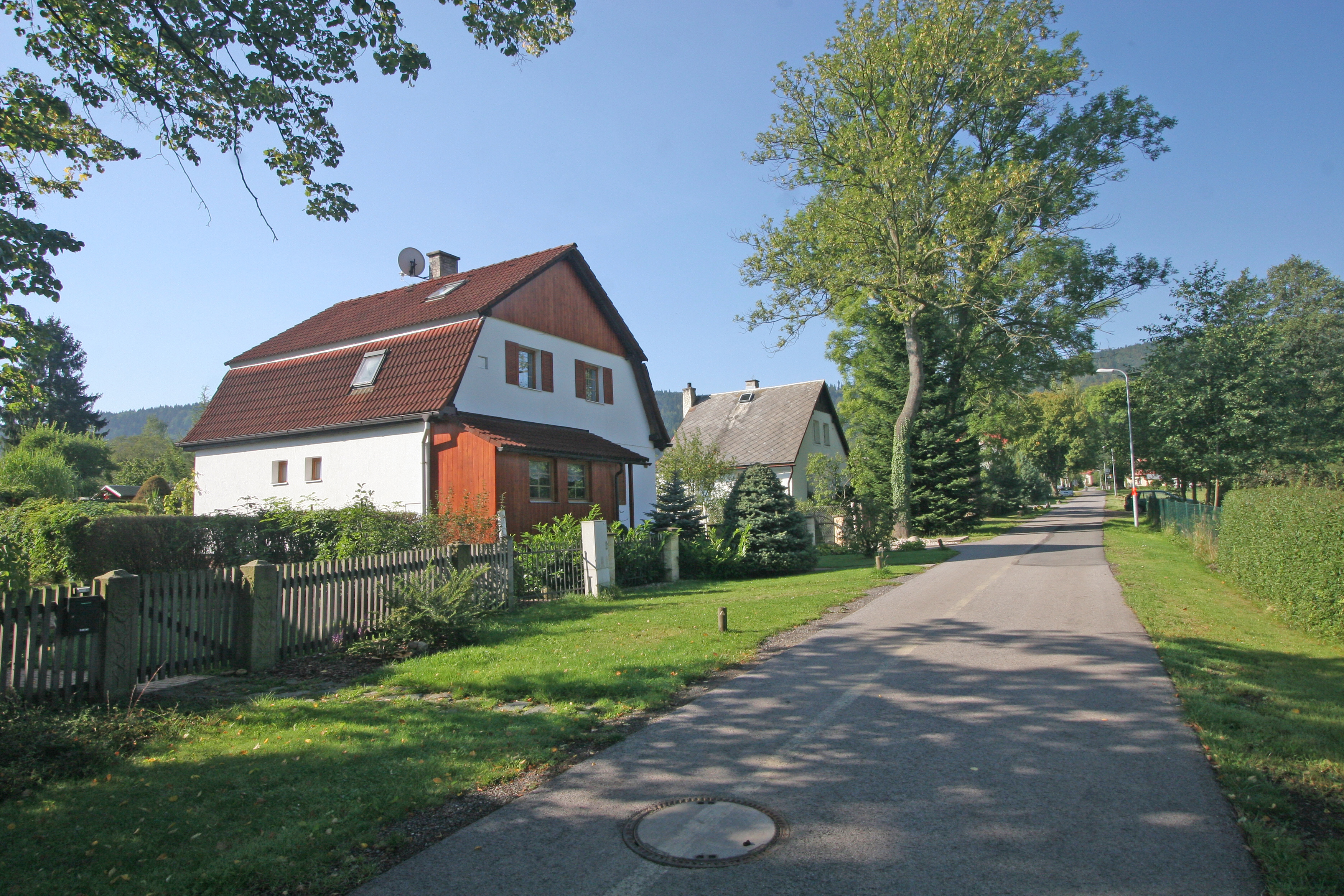 Bobr čp. 117 ?